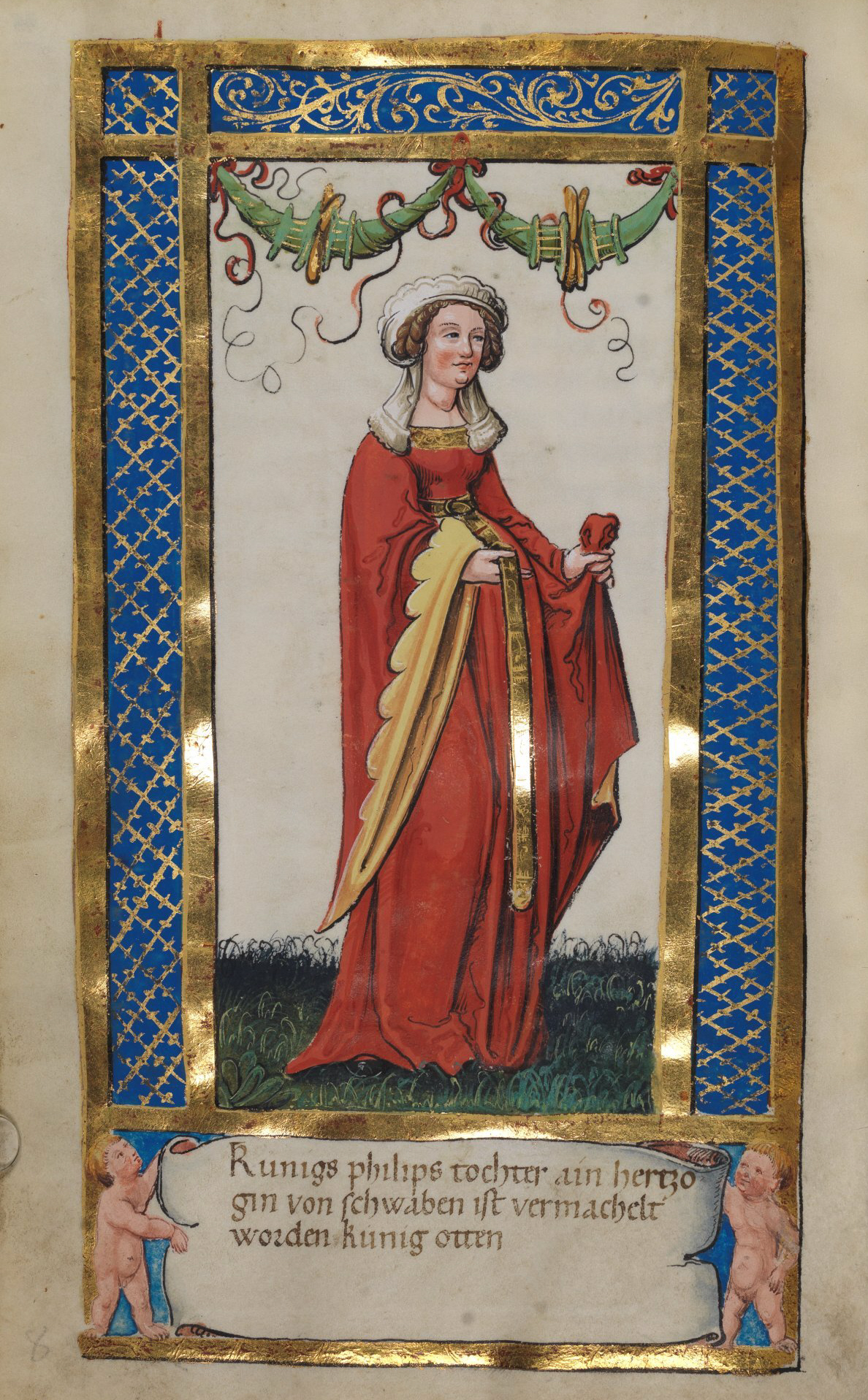 Weingartener Stifterbüchlein, Württembergische Landesbibliothek Stuttgart, Cod.hist.qt.584, fol. 39v, Stifterbild Beatrix, Tochter des Königs Philipp von Schwaben, Ehefrau Kaiser Ottos IV. Kunigs philips tochter ain hertzogin von schwaben ist vermachelt worden kunig otten